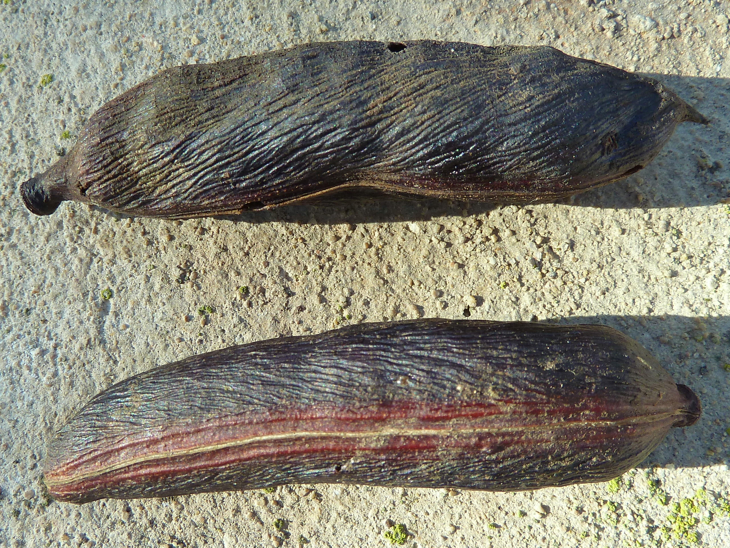 Acacia farnesiana: frutos (vainas) maduros - Albatera (Alicante)